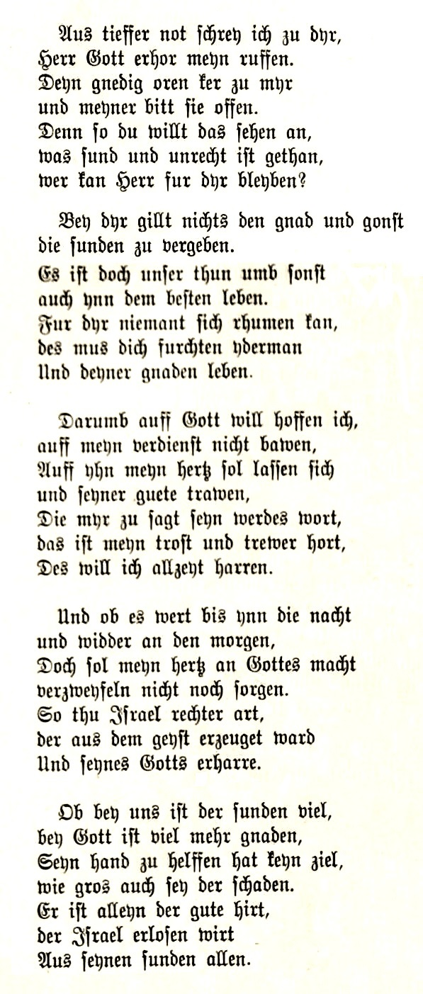 Aus tiefer Not schrei ich zu dir, 5-strophige Version, Wittenbergisches Gesangbuch 1524, Nachdruck WA 35